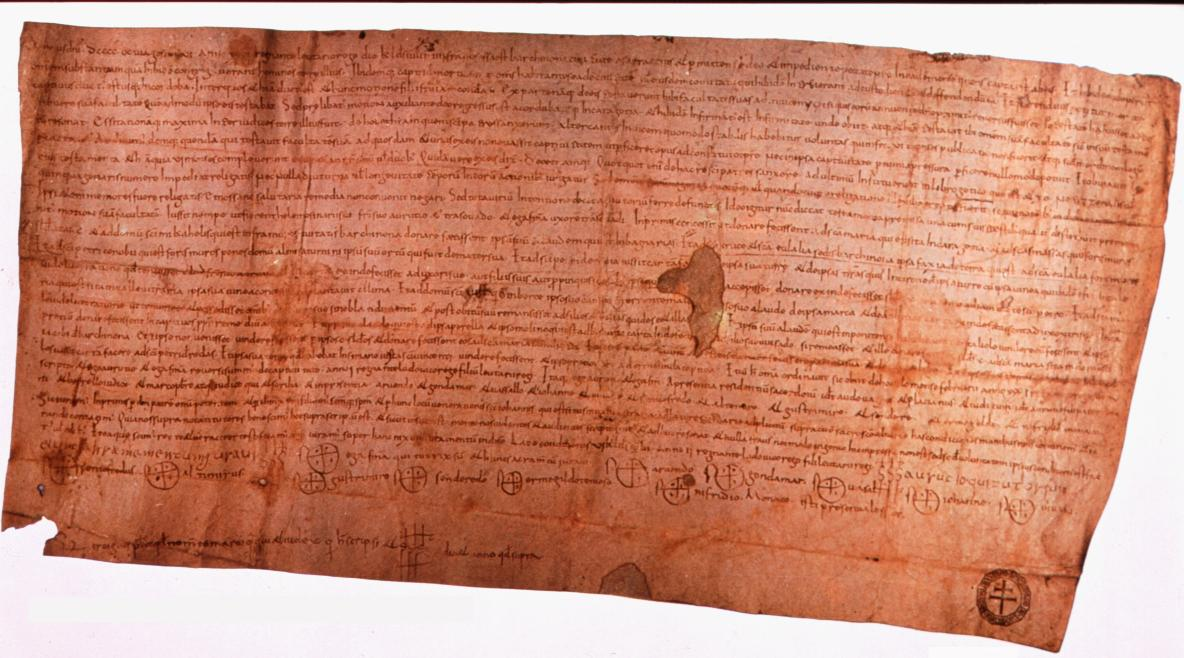 Pergamí del testament sacramental de Muç (987)